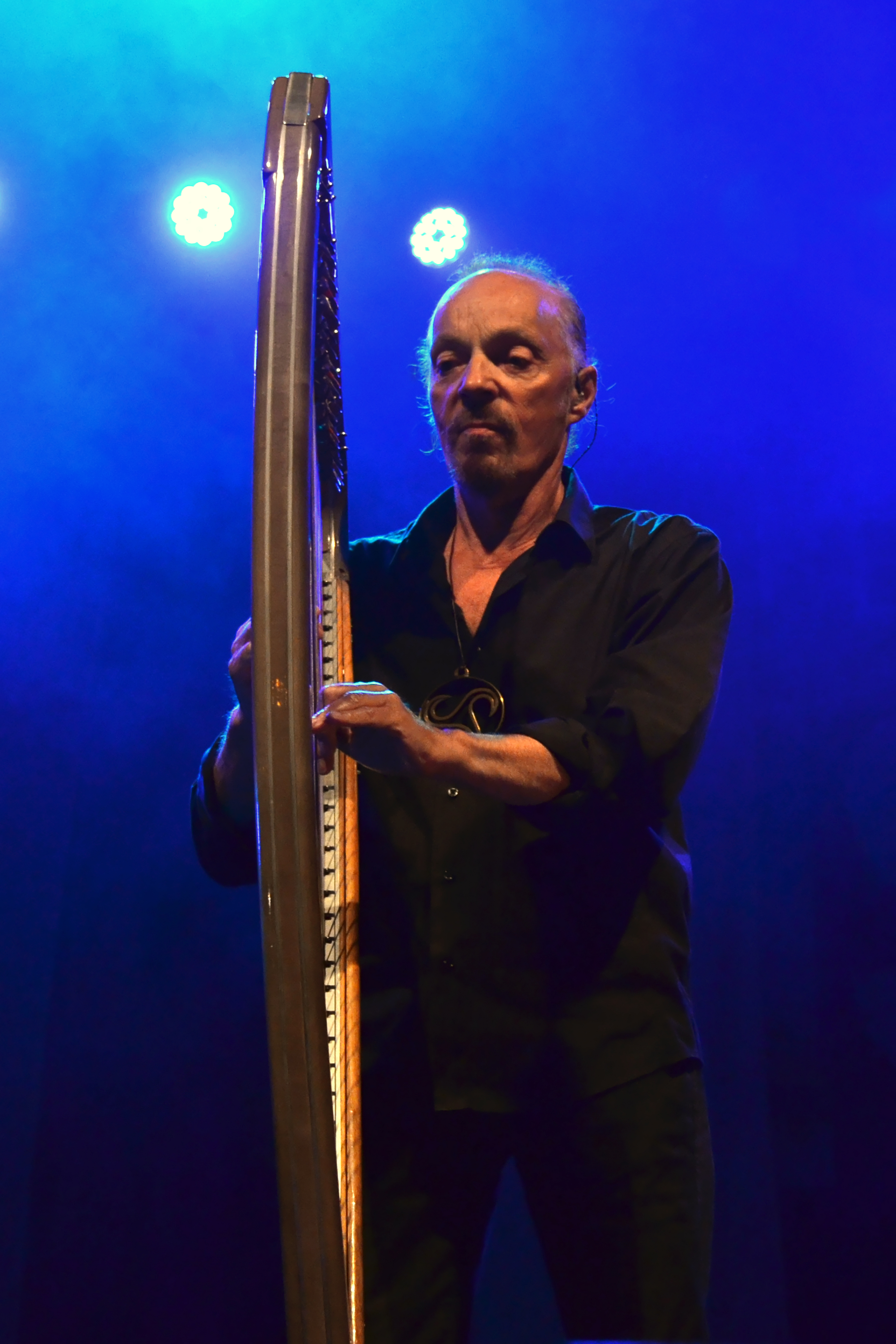 Alan Stivell en concert gratuit lors des Jeudis du port à Brest le 15 août 2013.